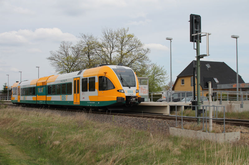 Gelb weißer „GTW“ der Ostdeutschen Eisenbahngesellschaft auf Strecke OE51 zwischen Brandenburg an der Havel und Rathenow am Bahnhof in Fohrde(Havelsee)